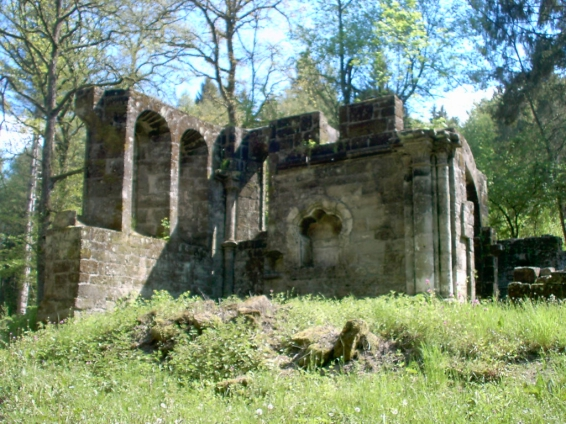 fondations de la Chapelle Romane de l'ancien prieuré de Bonneval (commune de Saint Baslemont - Vosges)